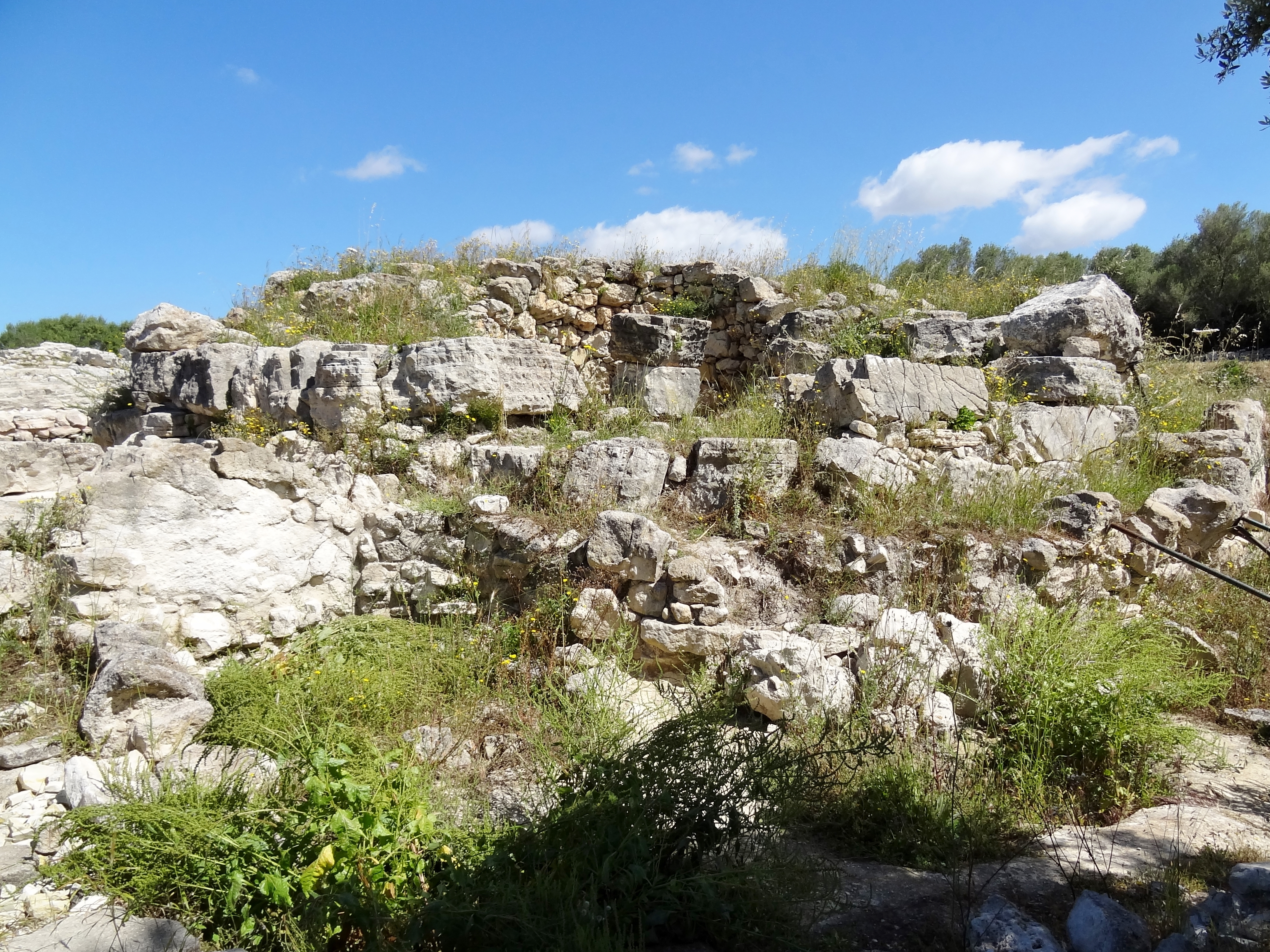 Talaiot 2 der Ausgrabungsstätte von Son Fornés, Gemeinde Montuïri, Mallorca, Spanien